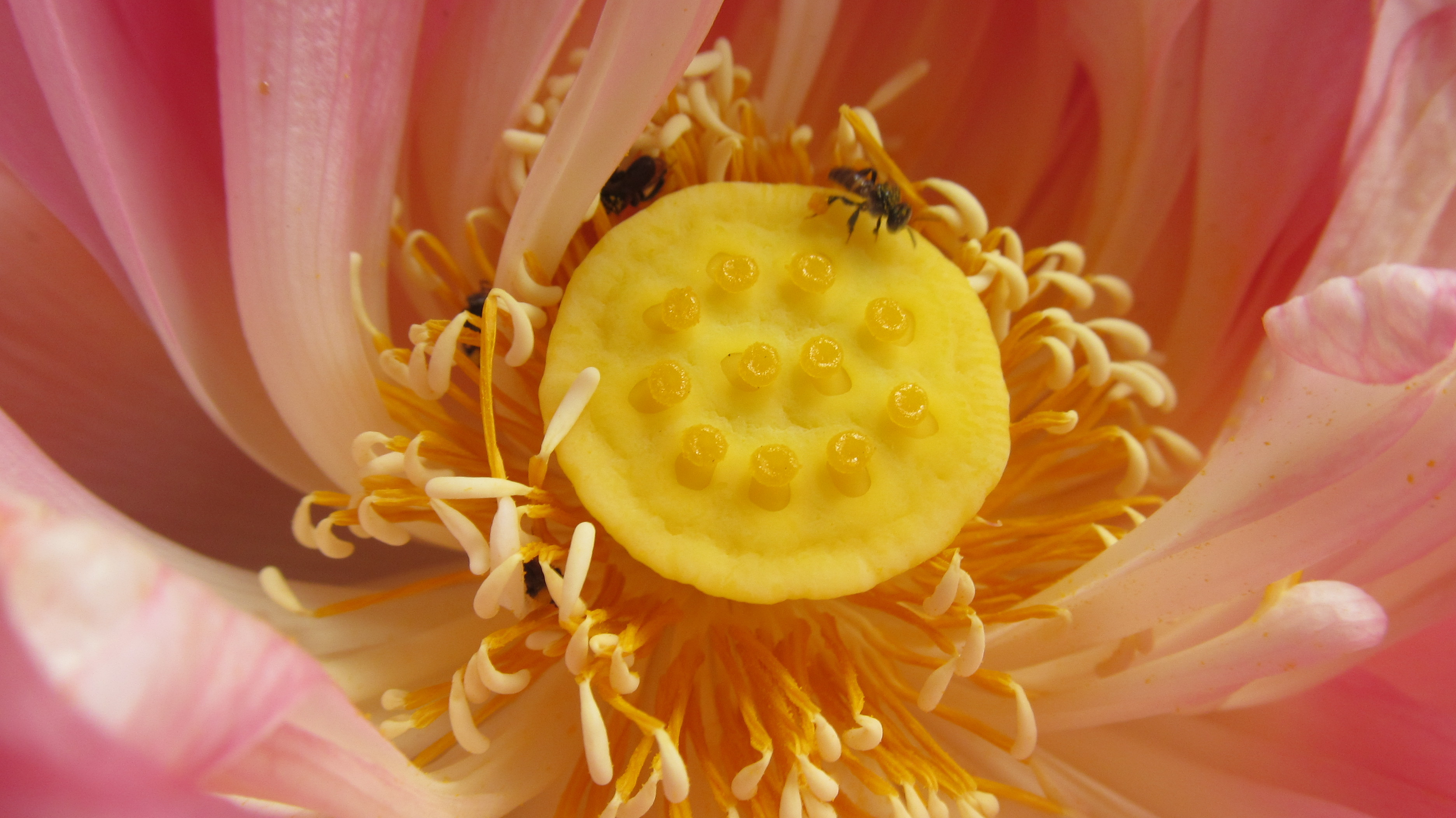 താമരയുടെ കേന്ദ്രഭാഗം. തേനീച്ചകളെയും കാണാം.